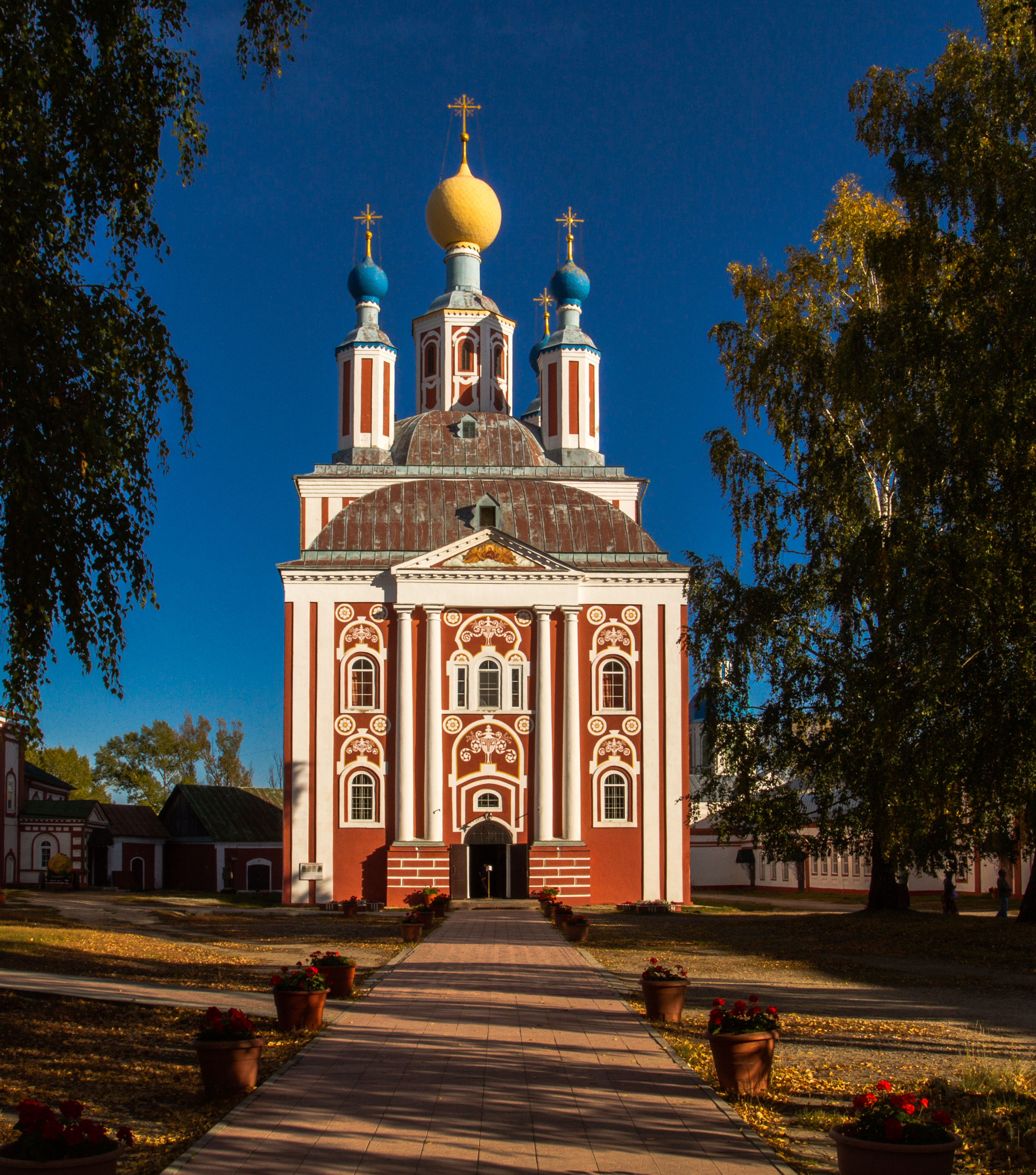 Собор Рождества Пресвятой Богородицы: Санаксарь, Темниковский район, Мордовия